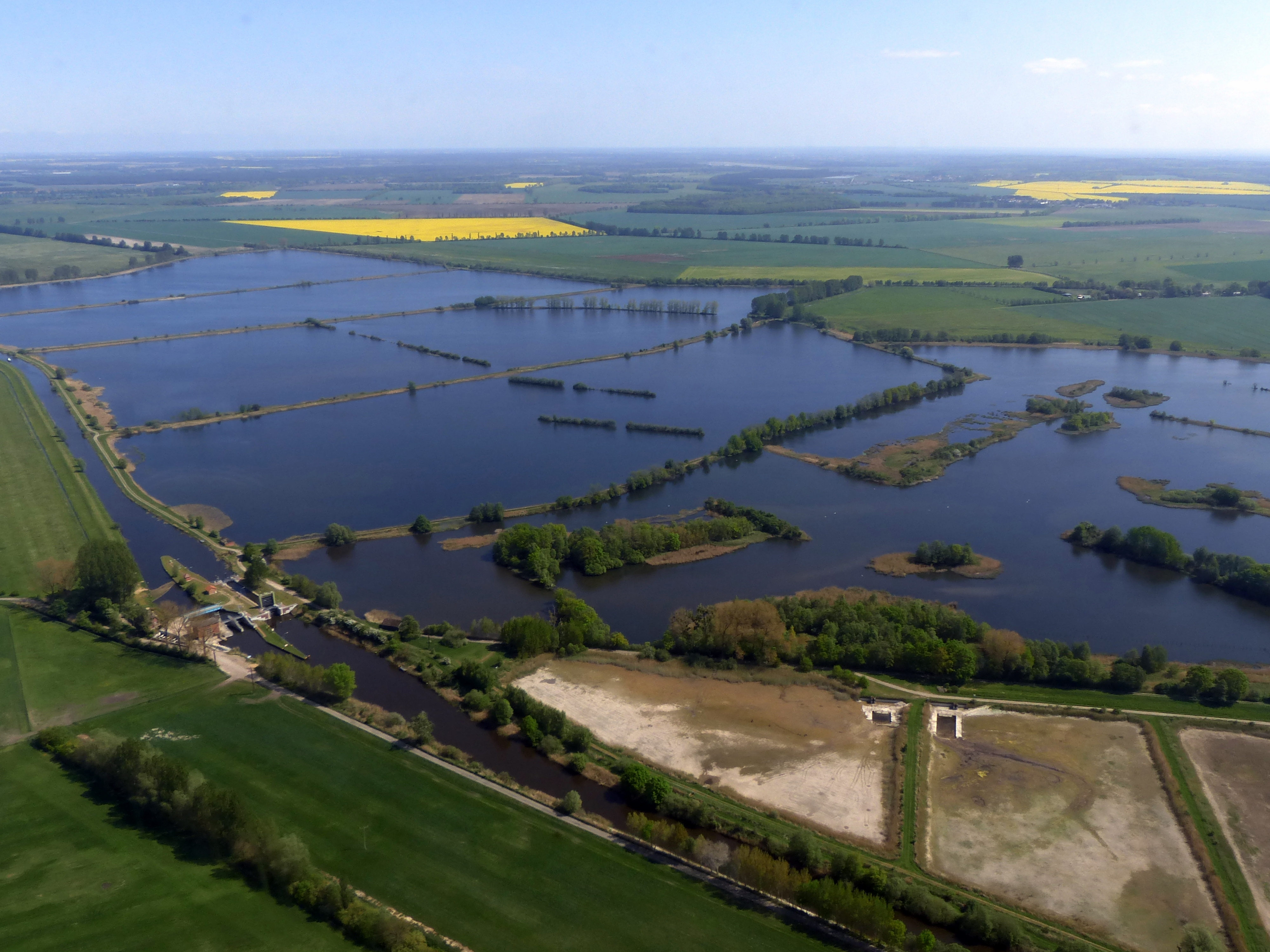 Blick auf die Lewitz und die abgelassenen Karpfenteiche.